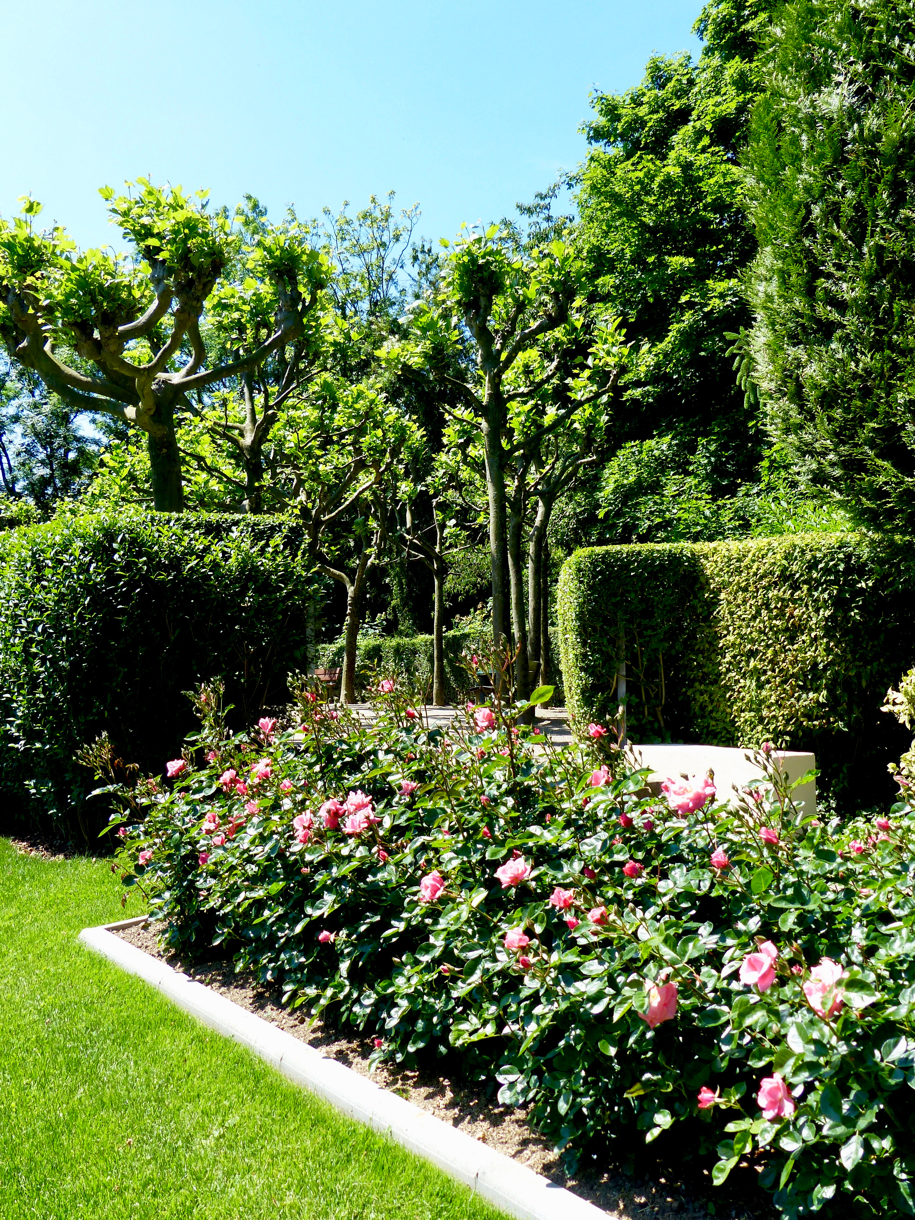 Rosengarten der Stadt Köln im Hilde-Domin-Park: Nordwest-Flügel des Rosengartens